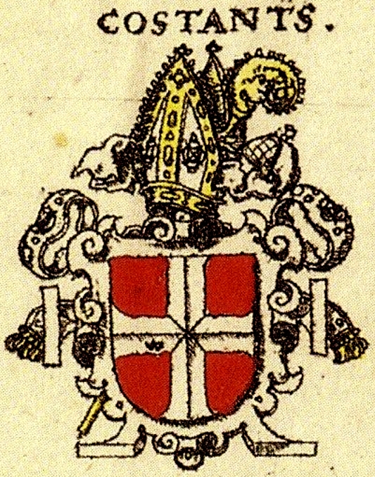 Wappen des Bistums Konstanz nach Siebmachers Wappenbuch